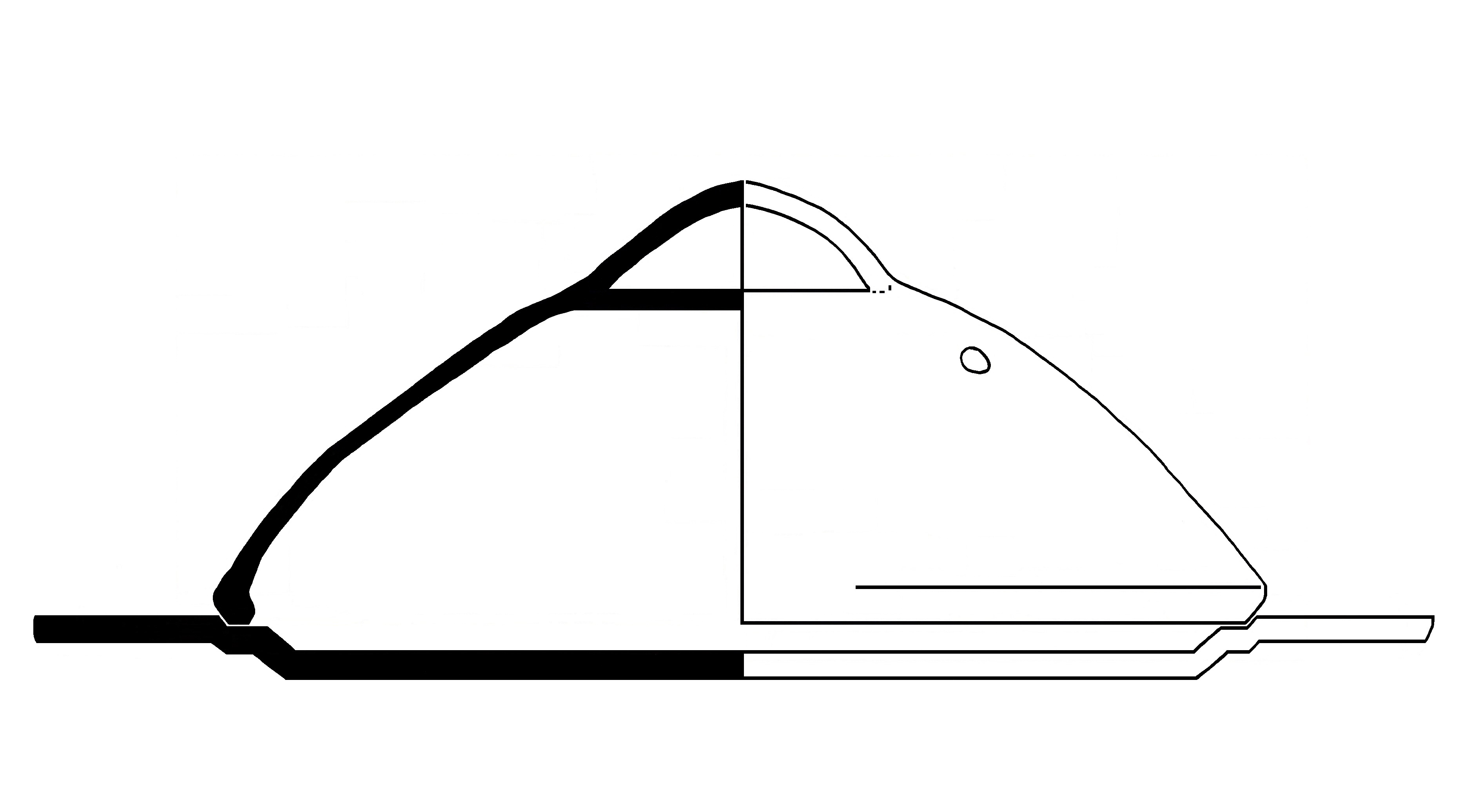 Der Klibanos (altgriechisch: κλίβανος), Klibanos in dem Brot gebacken wurde